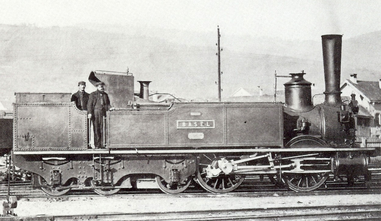 Die Ec 2/5 Nr. 2 der Schweizerische Centralbahn "Basel", noch ohne Puffer aber schon mit Speichenräder und Führerhaus. Somit zwingend vor 1874 aufgenomen.